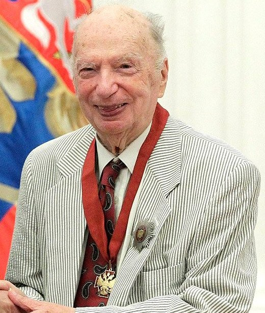 Оскар Борисович Фельцман на церемонии вручения государственных наград в Кремле, 28 июля 2011 года.